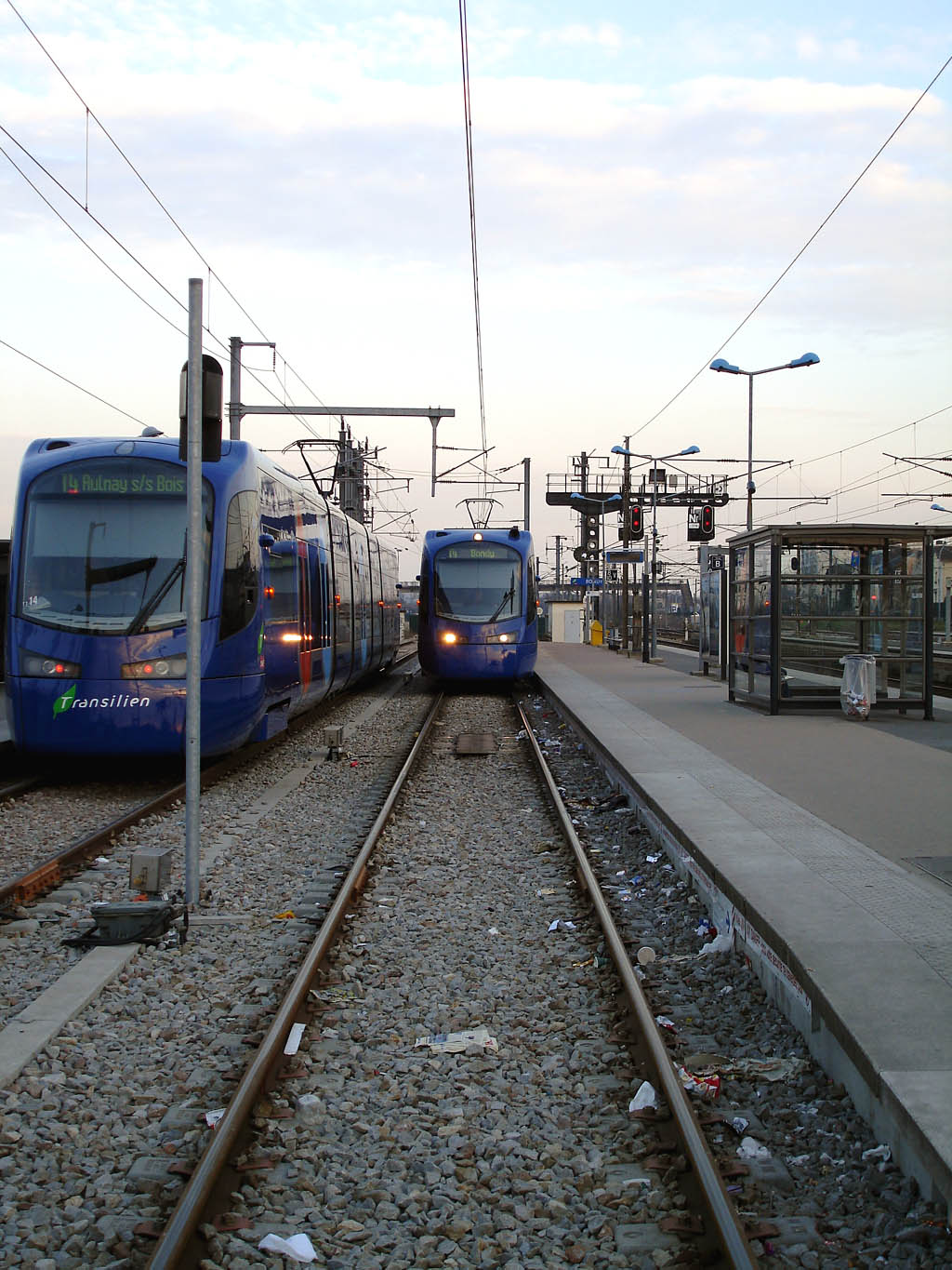 Gare de Bondy (Seine-Saint-Denis), France